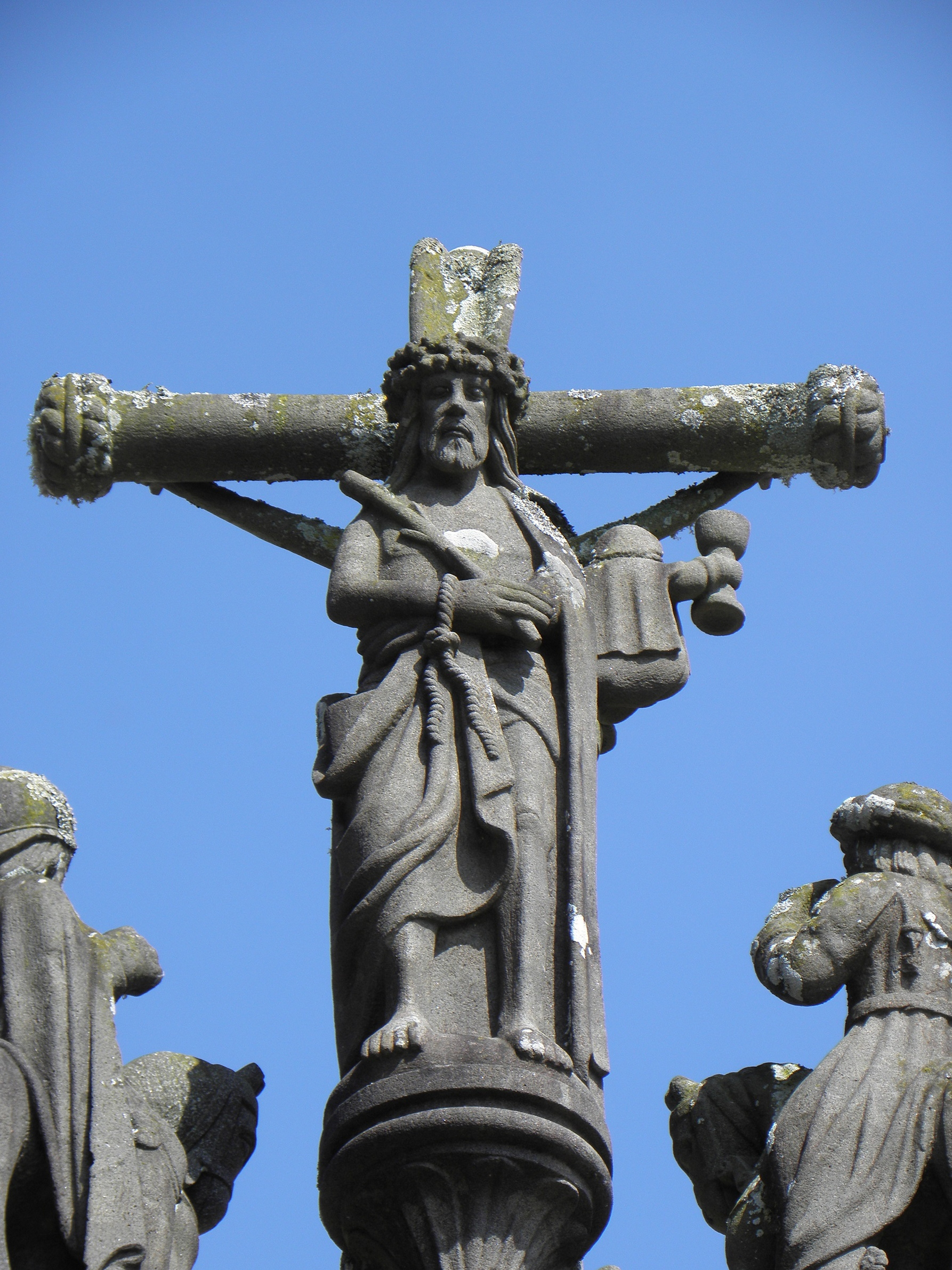 Calvaire de l'enclos paroissial de Locmélar (29). Ecce Homo.